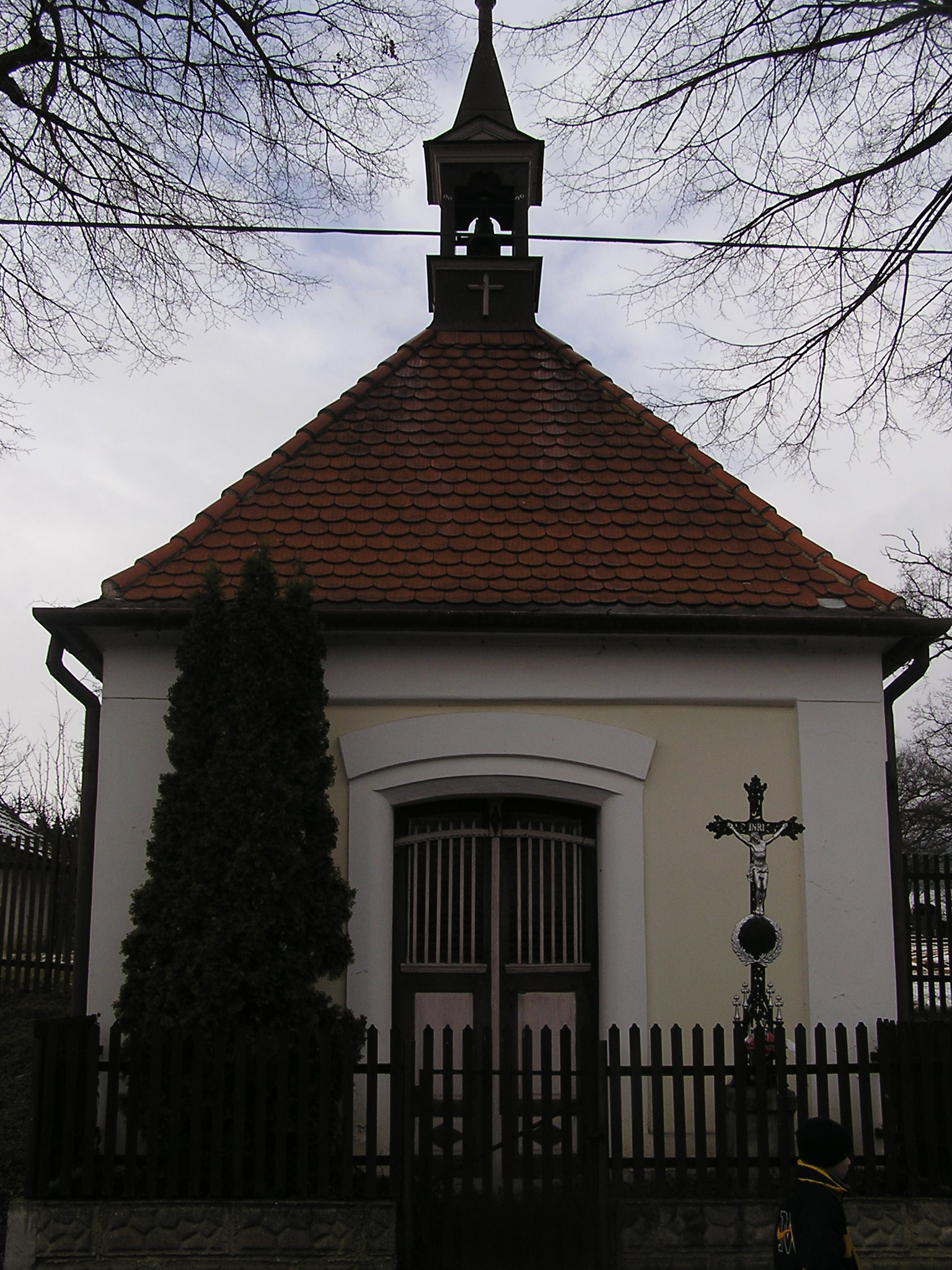 Kaple v Senešnici